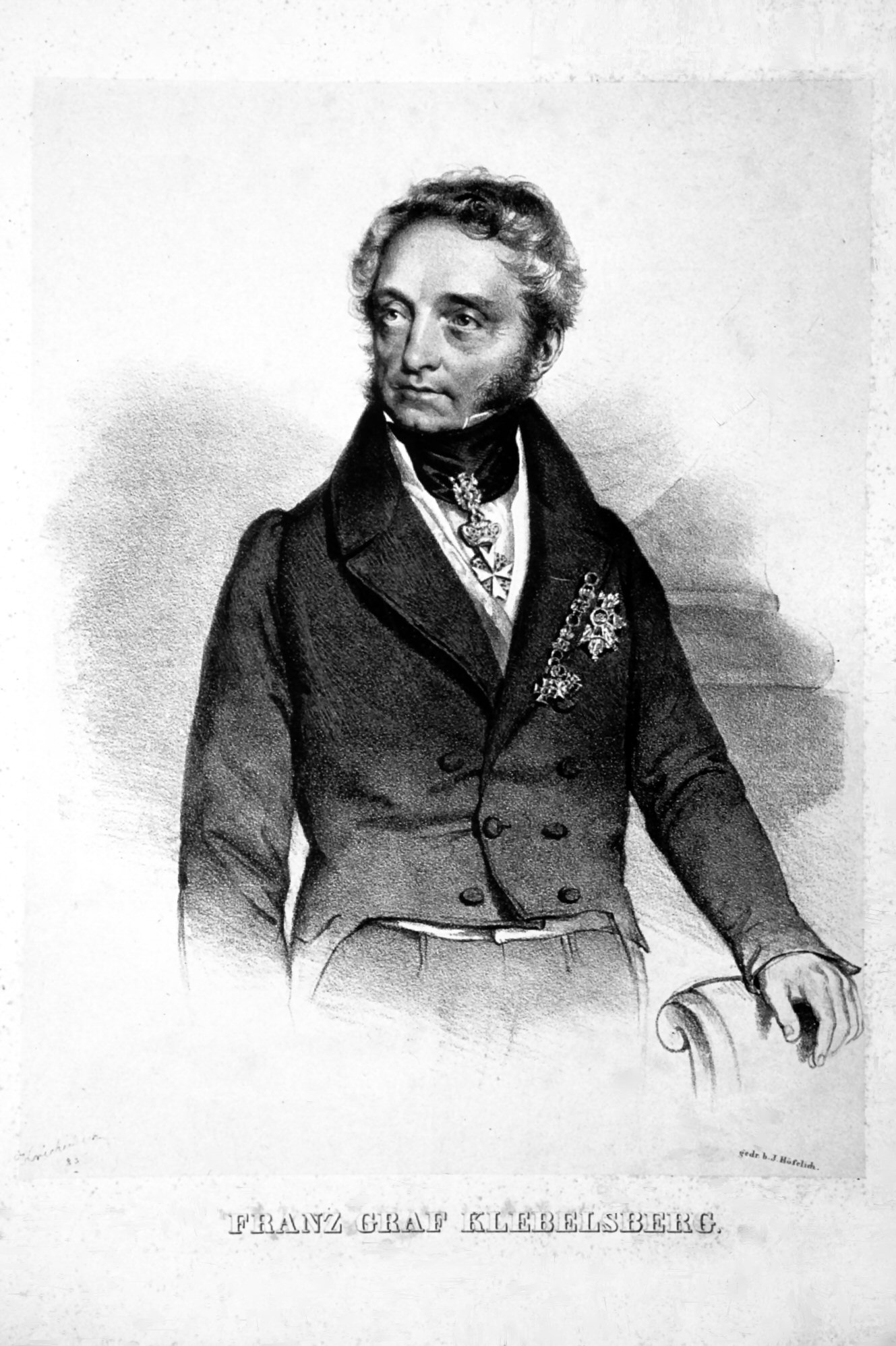 Franz Graf Klebelsberg (1774-1857), k. k. Hofkammerpräsident